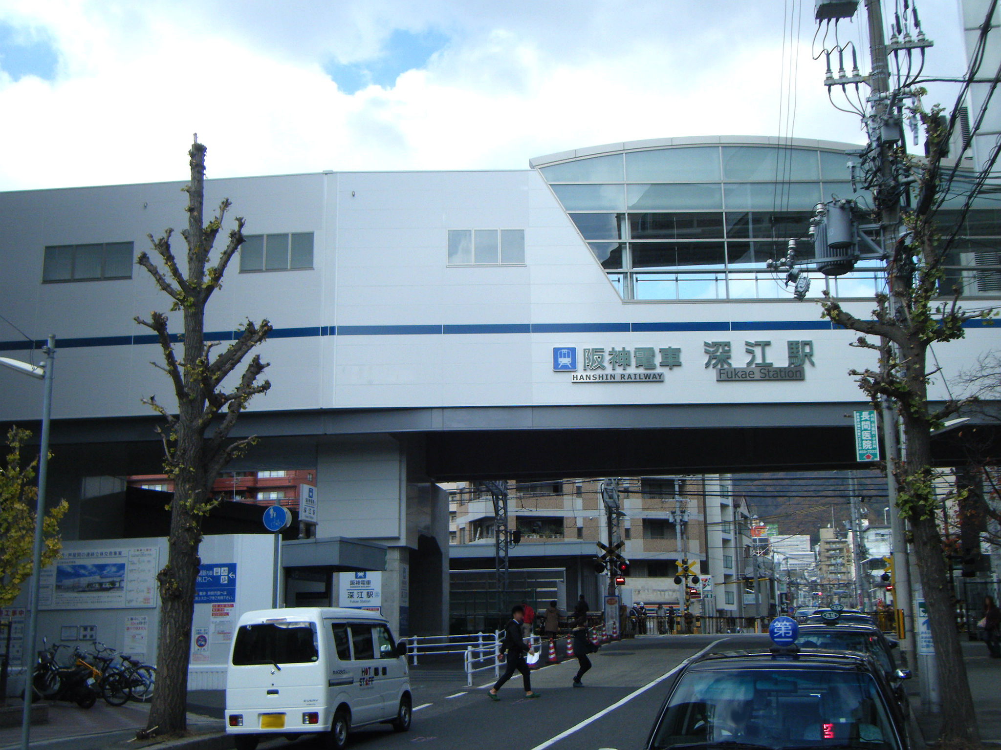 阪神深江駅 下り高架駅舎